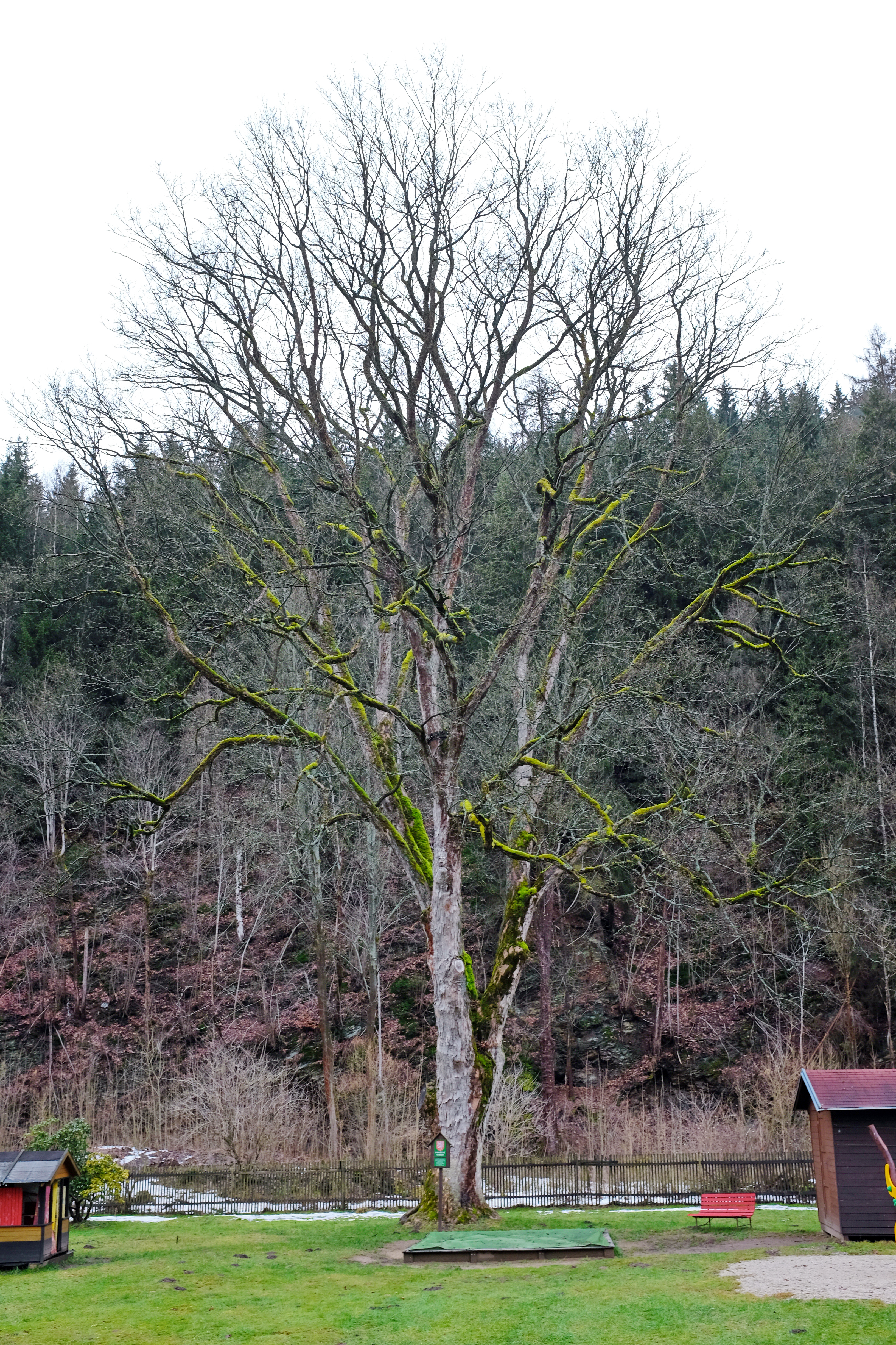 Památný strom - Klen u secesní vily, Kraslice, okres Sokolov